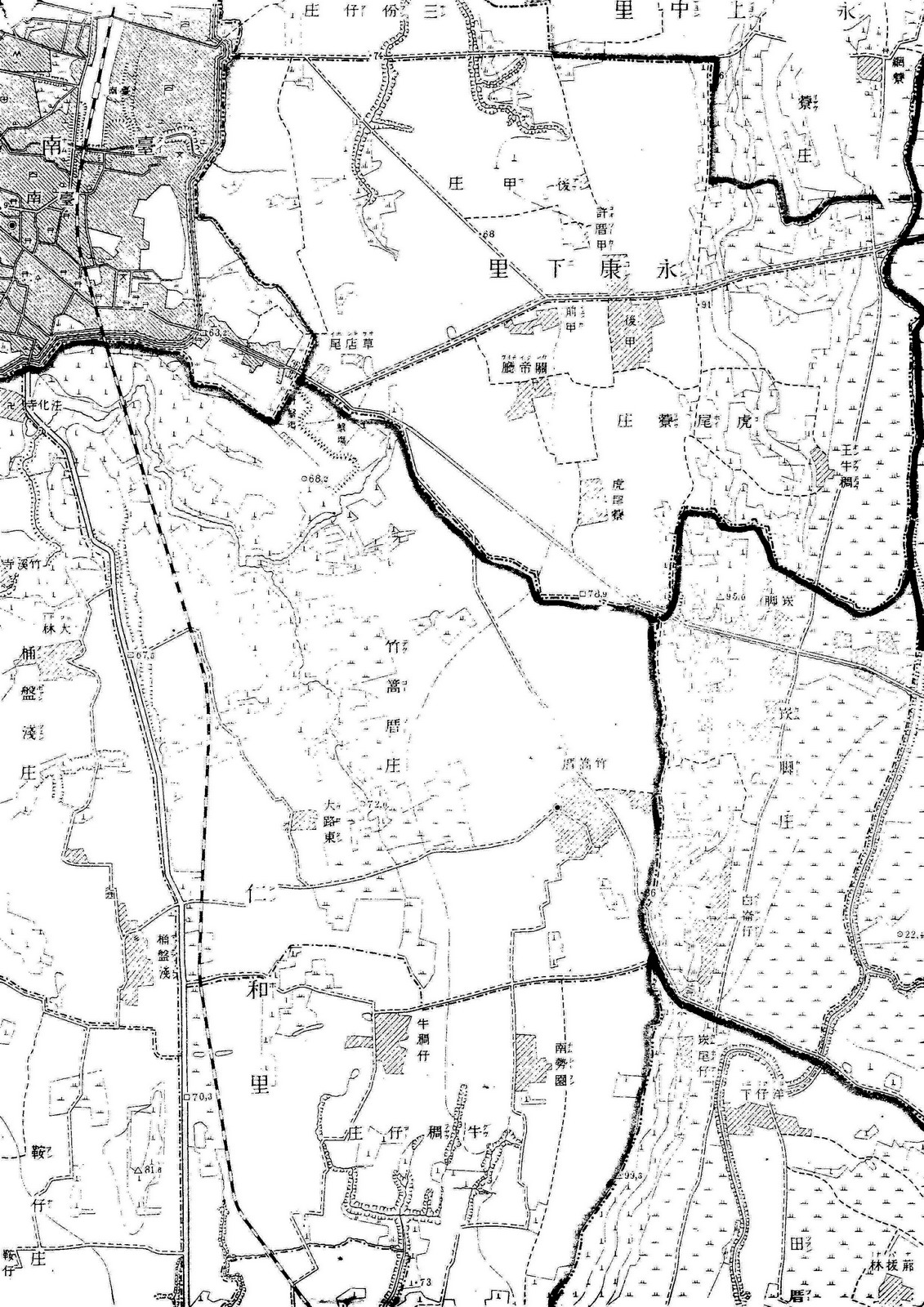 中文（台灣）: 部分台灣堡圖，黑線範圍內為台南市東區